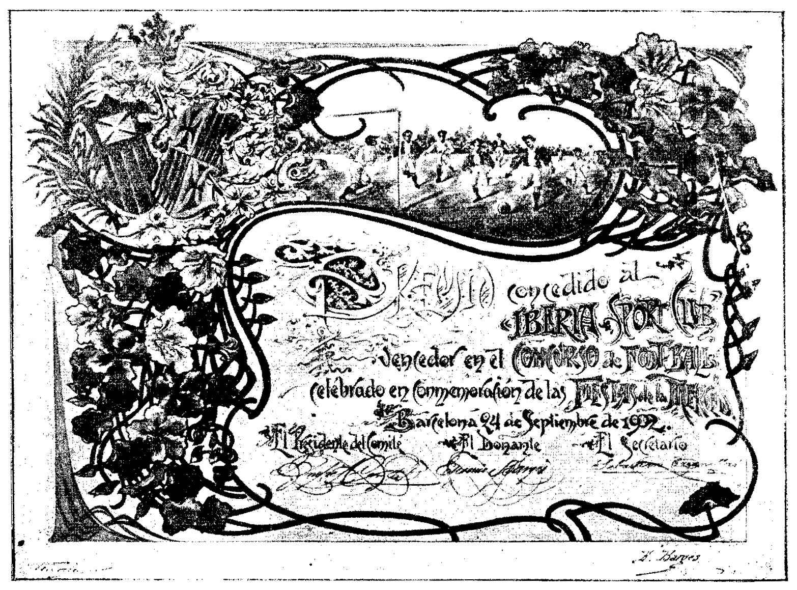 Reproducció en blanc i negre del pergamí entregat al guanyador del concurs futbolístic del mateix nom.